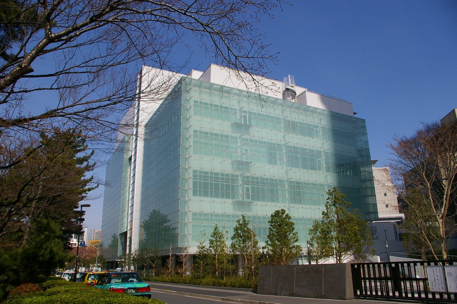 外壕校舎.